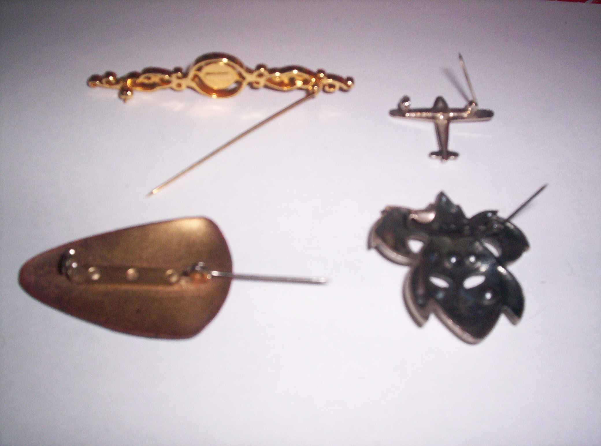 brooch-side.jpg